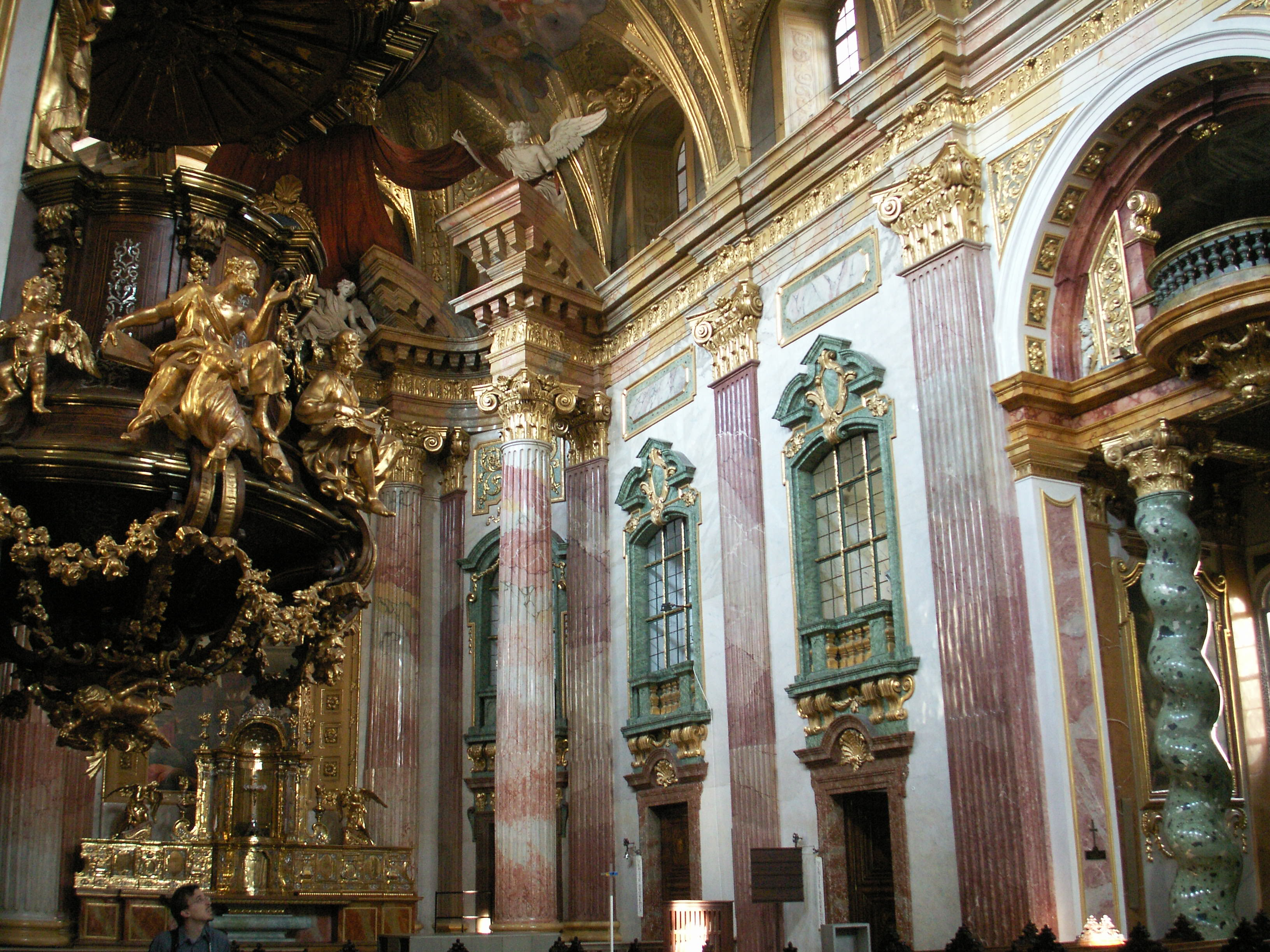 Jesuitenkirche, Wien